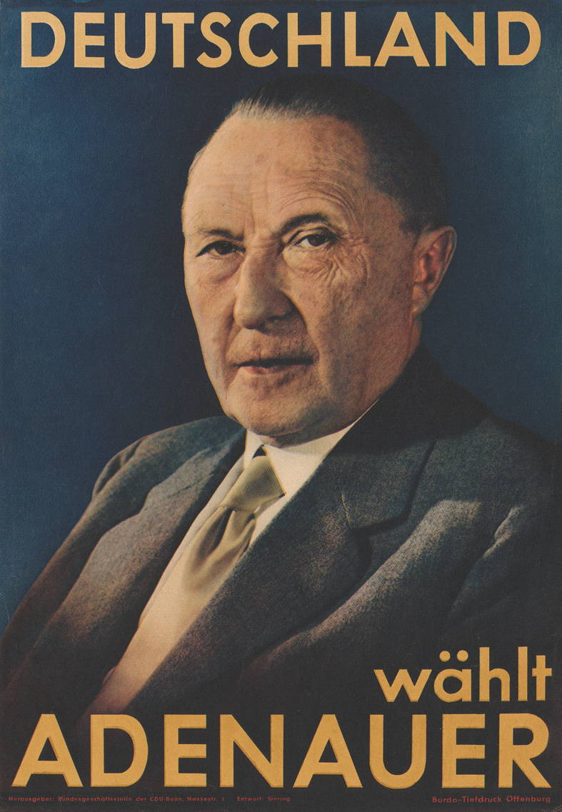 Deutschland wählt Adenauer Abbildung:PorträtfotoPlakatart:Kandidaten-/Personenplakat mit PorträtKünstler_Grafiker:SieringAuftraggeber:CDU-Bundesgeschäftsstelle BonnDrucker_Druckart_Druckort:Burda-Tiefdruck, OffenburgObjekt-Signatur:10-001: 427Bestand:Plakate zu Bundestagswahlen (10-001)GliederungBestand10-18:Plakate zu Bundestagswahlen (10-001) » Die 2. Bundestagswahl am 6. September 1953 » CDU » Mit PorträtfotoLizenz:KAS/ACDP 10-001: 427 CC-BY-SA 3.0 DE